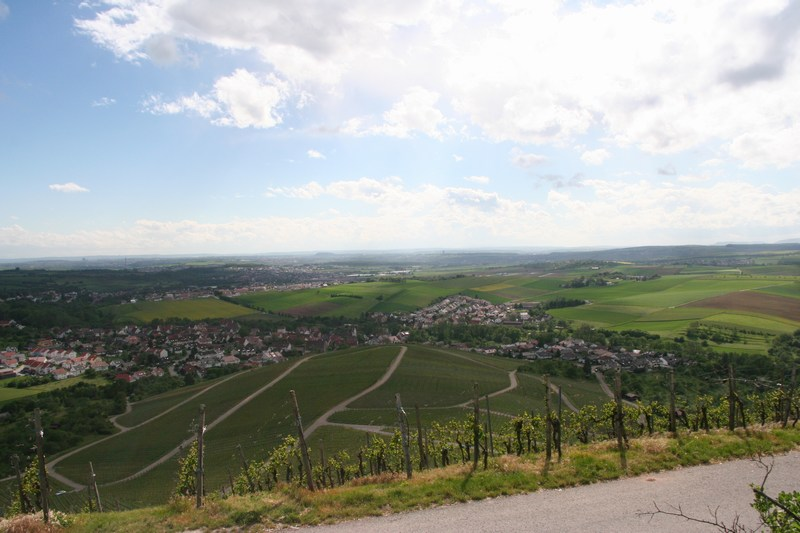 Kleinbottwar vom Benning (Weinberg)